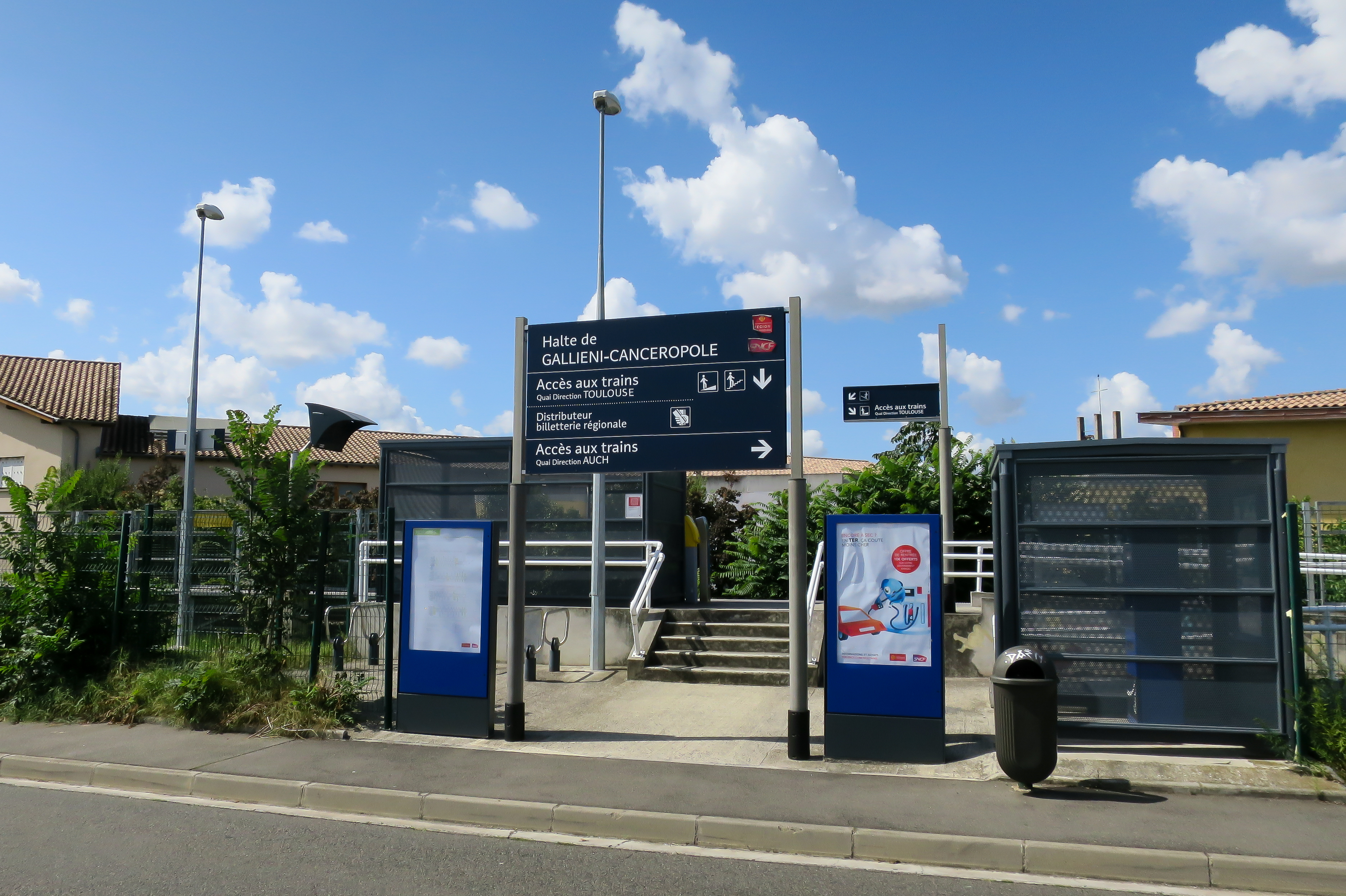 Accès au quai de la gare de Gallieni-Cancéropôle en direction de la gare de Toulouse-Matabiau / Toulouse, France